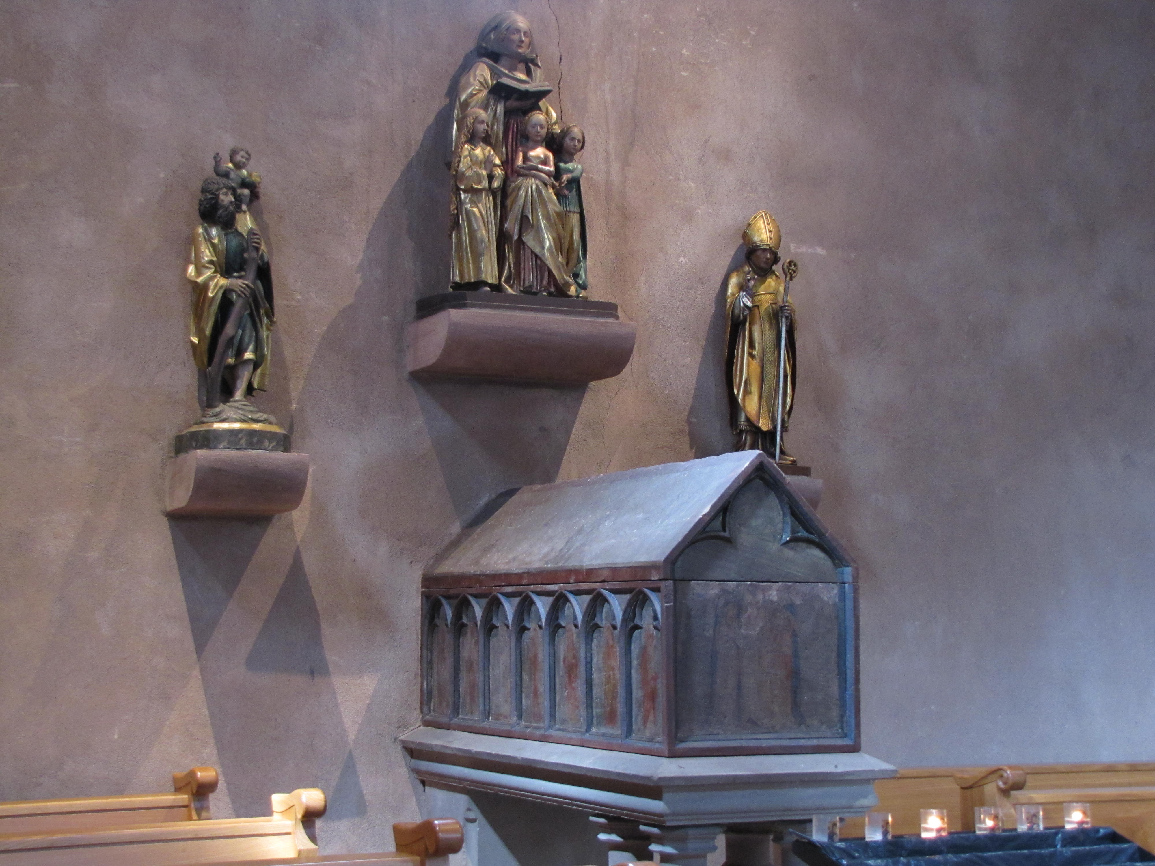 Alsace, Bas-Rhin, Église Saint-Trophime d'Eschau (PA00084707, IA00023089). Châsse de Sainte-Sophie (XIVe): This object is classé Monument Historique in the base Palissy, database of the French furniture patrimony of the French ministry of culture, under the references PM67000076 and IM67000135. Statue de St-Christophe portant l'enfant Jésus (1500): This object is classé Monument Historique in the base Palissy, database of the French furniture patrimony of the French ministry of culture, under the references PM67000072 and IM67000131. Groupe sculpté de Sainte-Sophie avec ses trois filles (1470): This object is classé Monument Historique in the base Palissy, database of the French furniture patrimony of the French ministry of culture, under the references PM67000074 and IM67000130. Statue de Saint-Rémi (XVe): This object is classé Monument Historique in the base Palissy, database of the French furniture patrimony of the French ministry of culture, under the references PM67000073 and IM67000126.